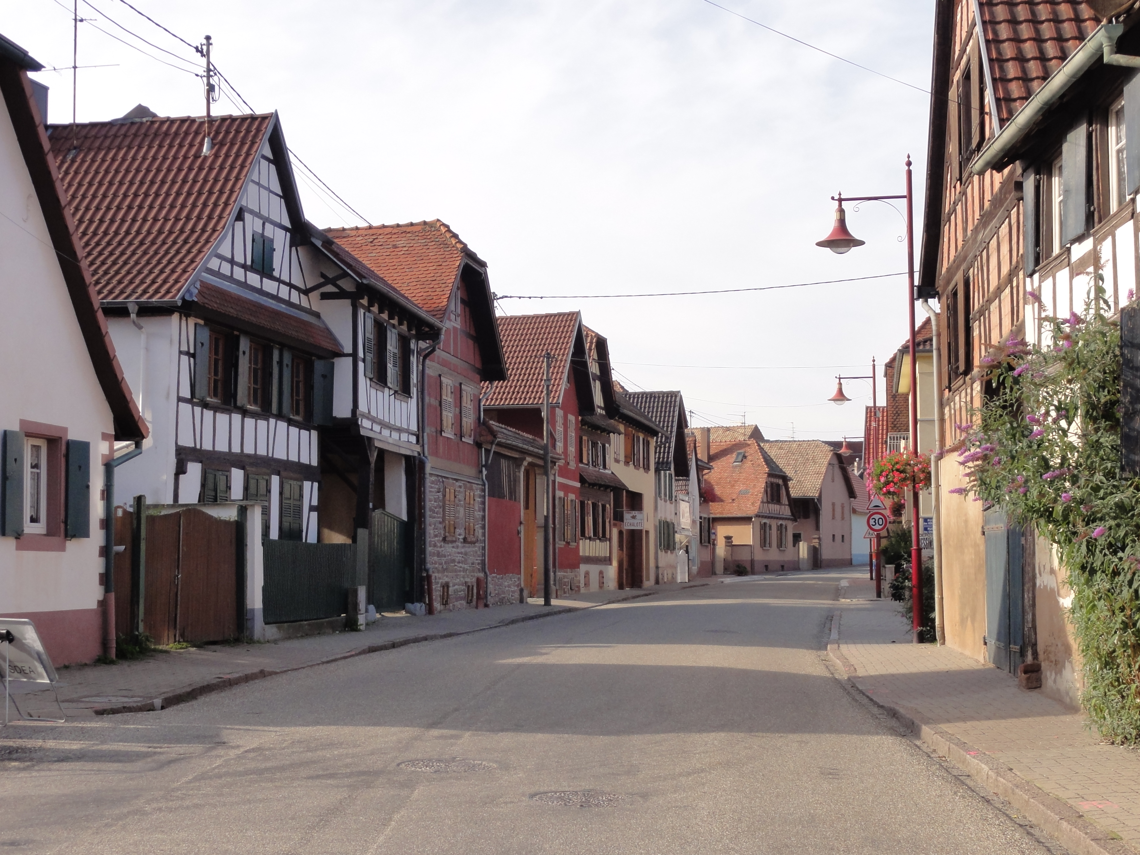 Alsace, Bas-Rhin, Furdenheim, Rue de la Mairie